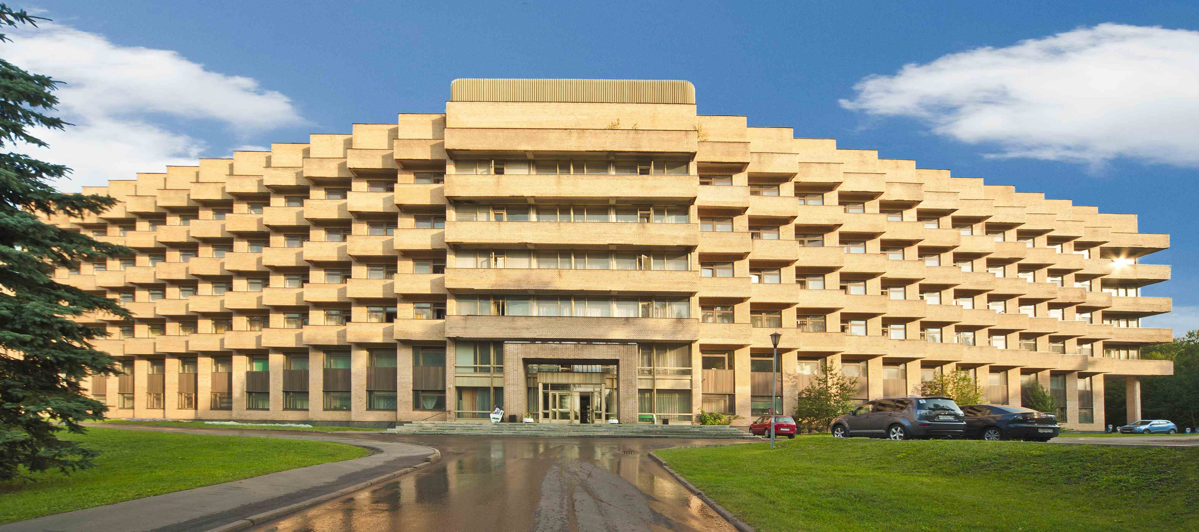 Фасад терапевтического корпуса